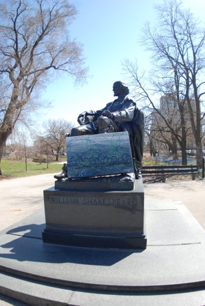 Skoff Art Hunt